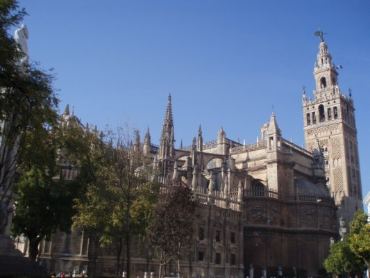 Foto de la catedral de sevilla